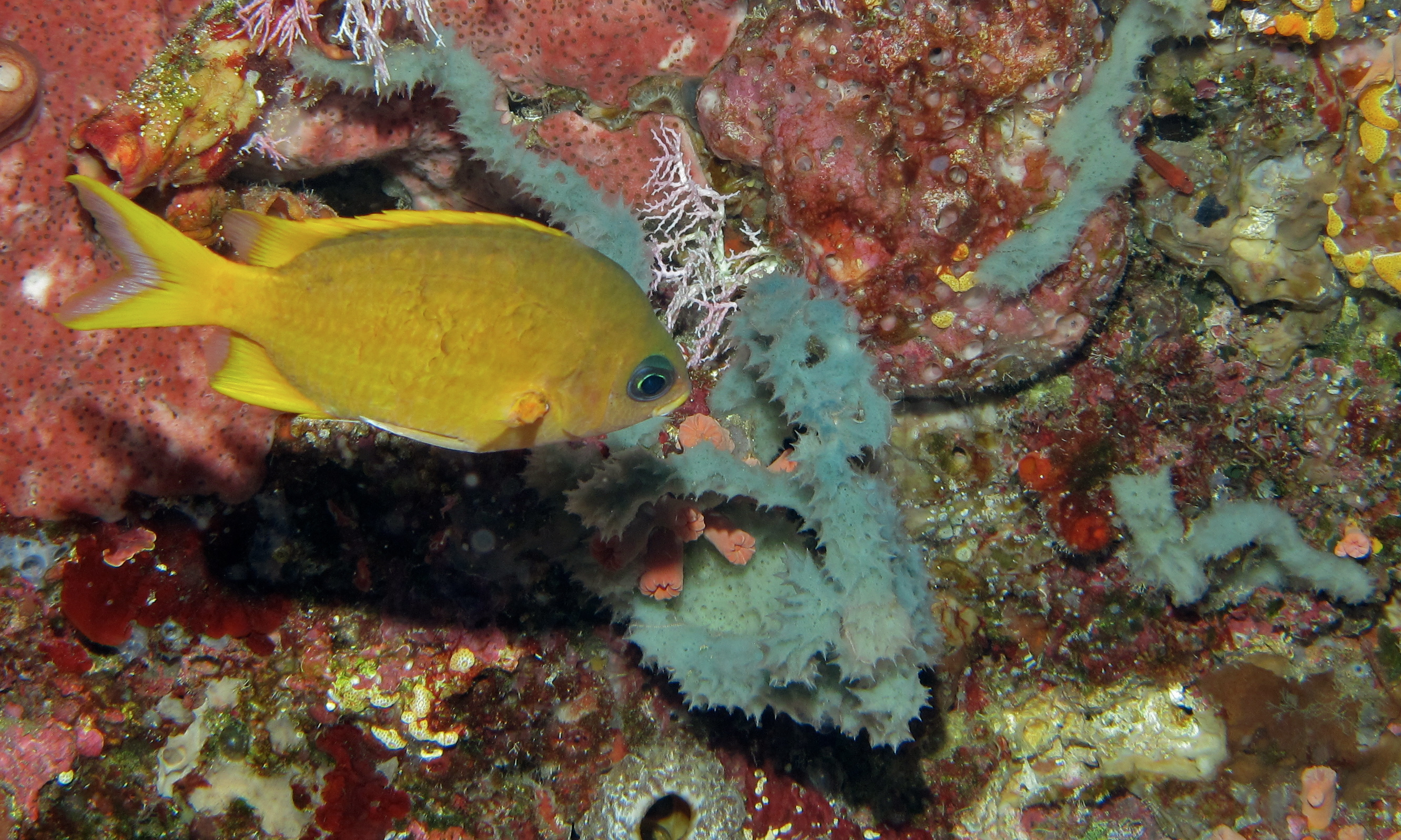 Tanjung, Bunaken Island, Sulawesi, INDONESIA